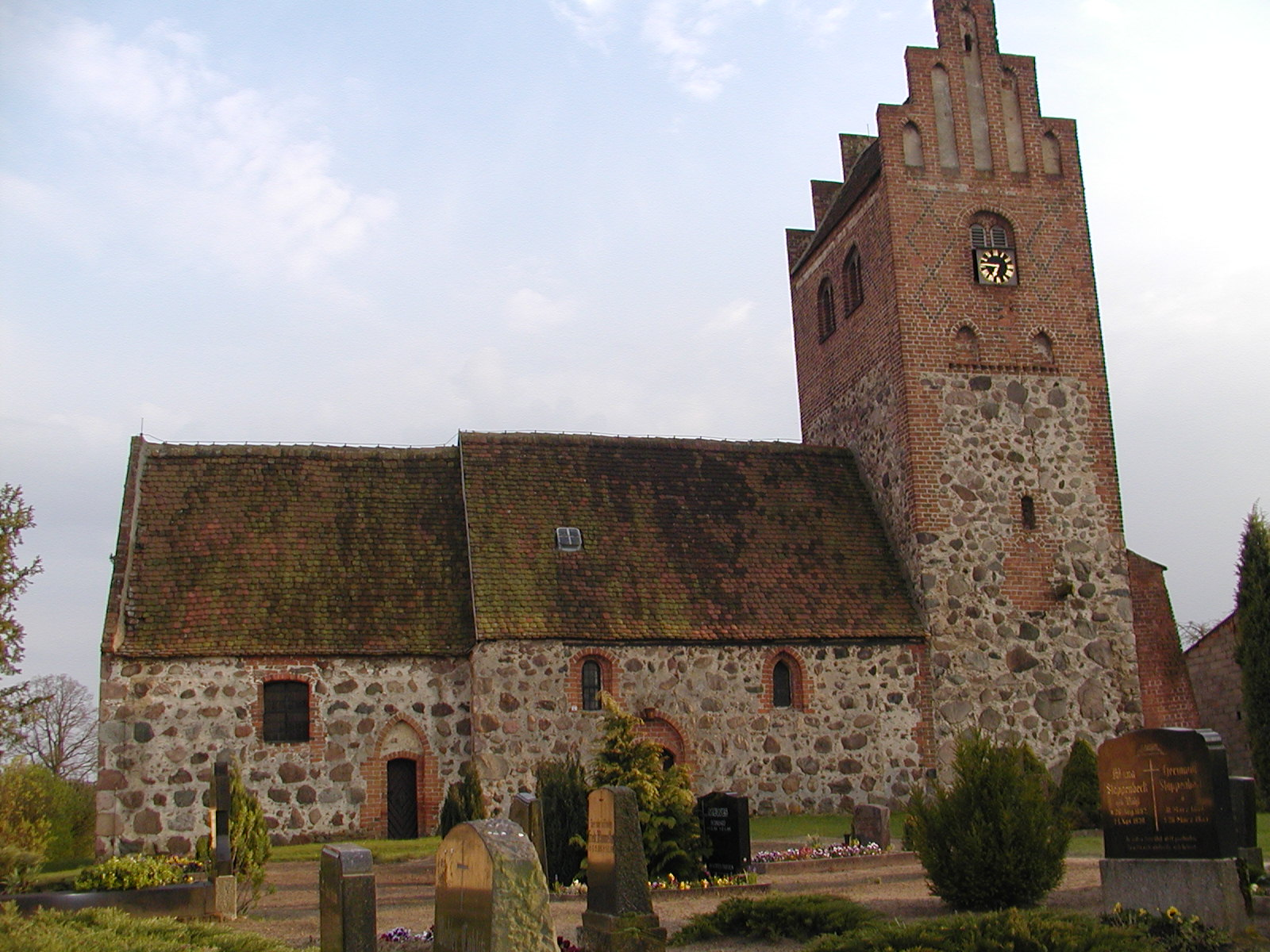 Kirche in Leppin 2002